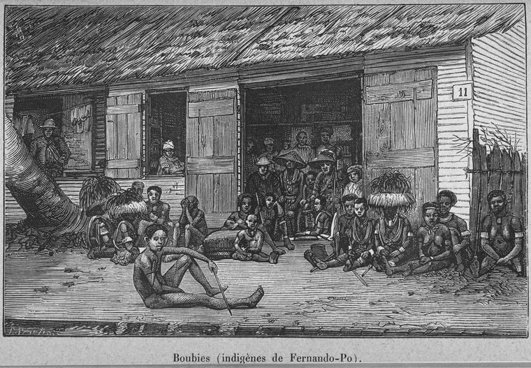 Boubies (indigènes de Fernando-Po)